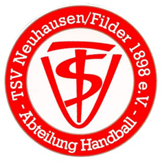 TSV Neuhausen-Filder Logo